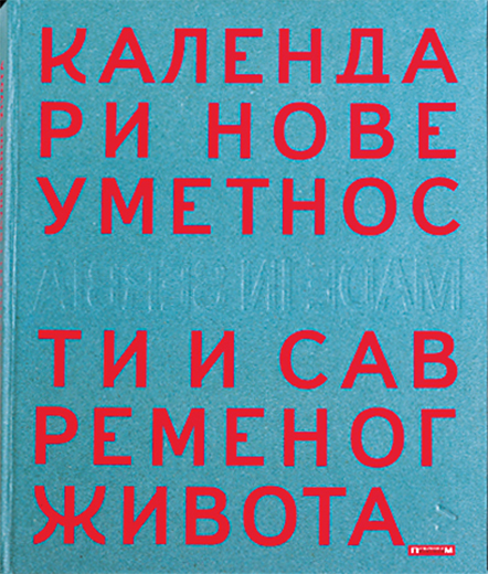 Monografija Publikum kalendar nove umetnosti. Foto: Đorđe Milekić